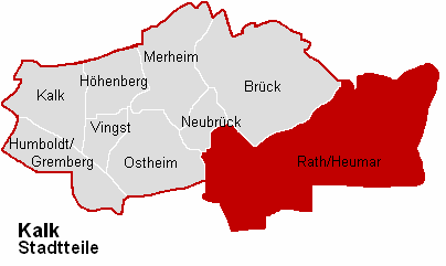 Lagekarte Rath/Heumar im Stadtbezirk Köln-Kalk